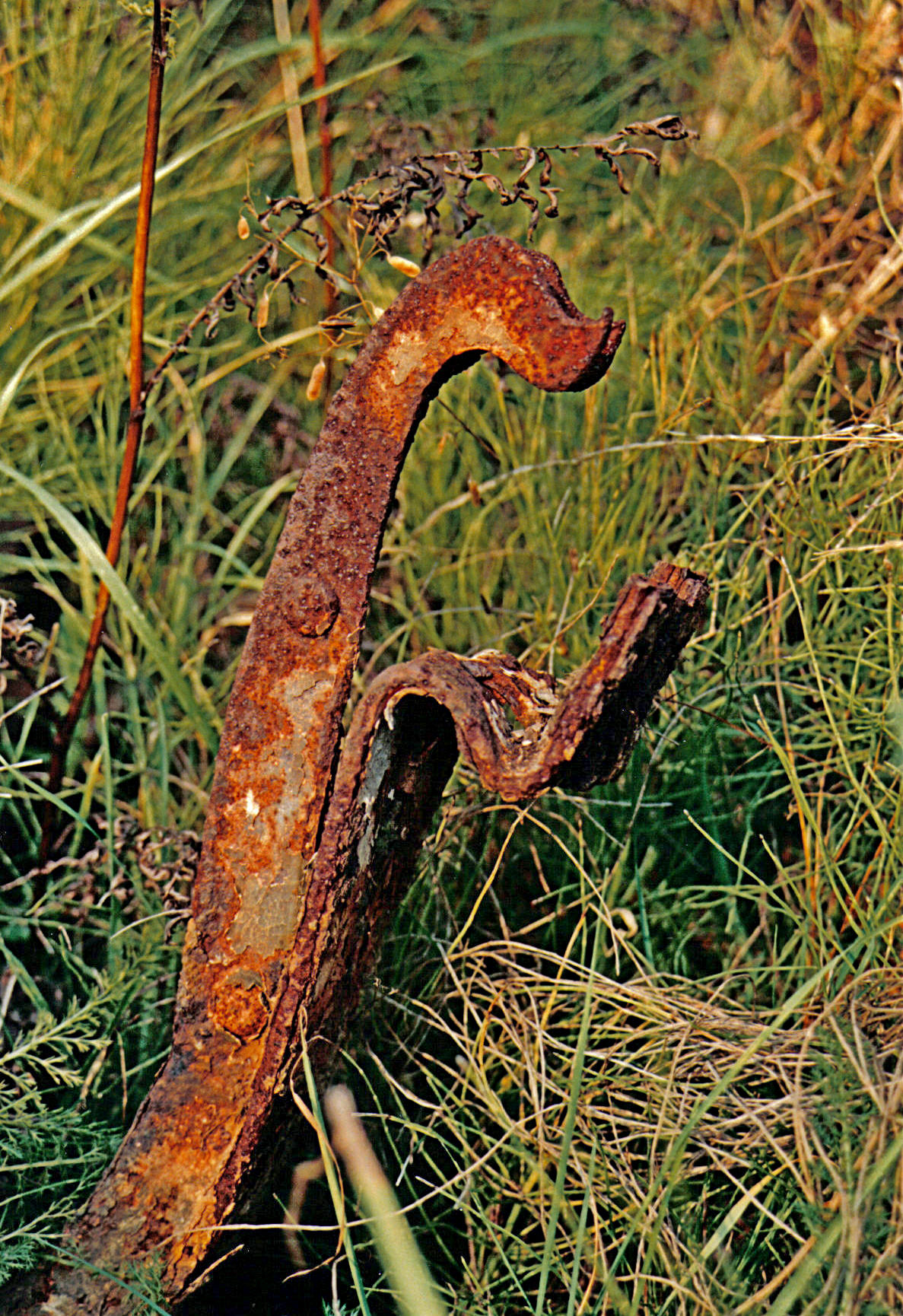 Belgique - Bruxelles - Maison du Peuple de Victor Horta : vestiges entreposés dans les champs à Jette dans les années 1980